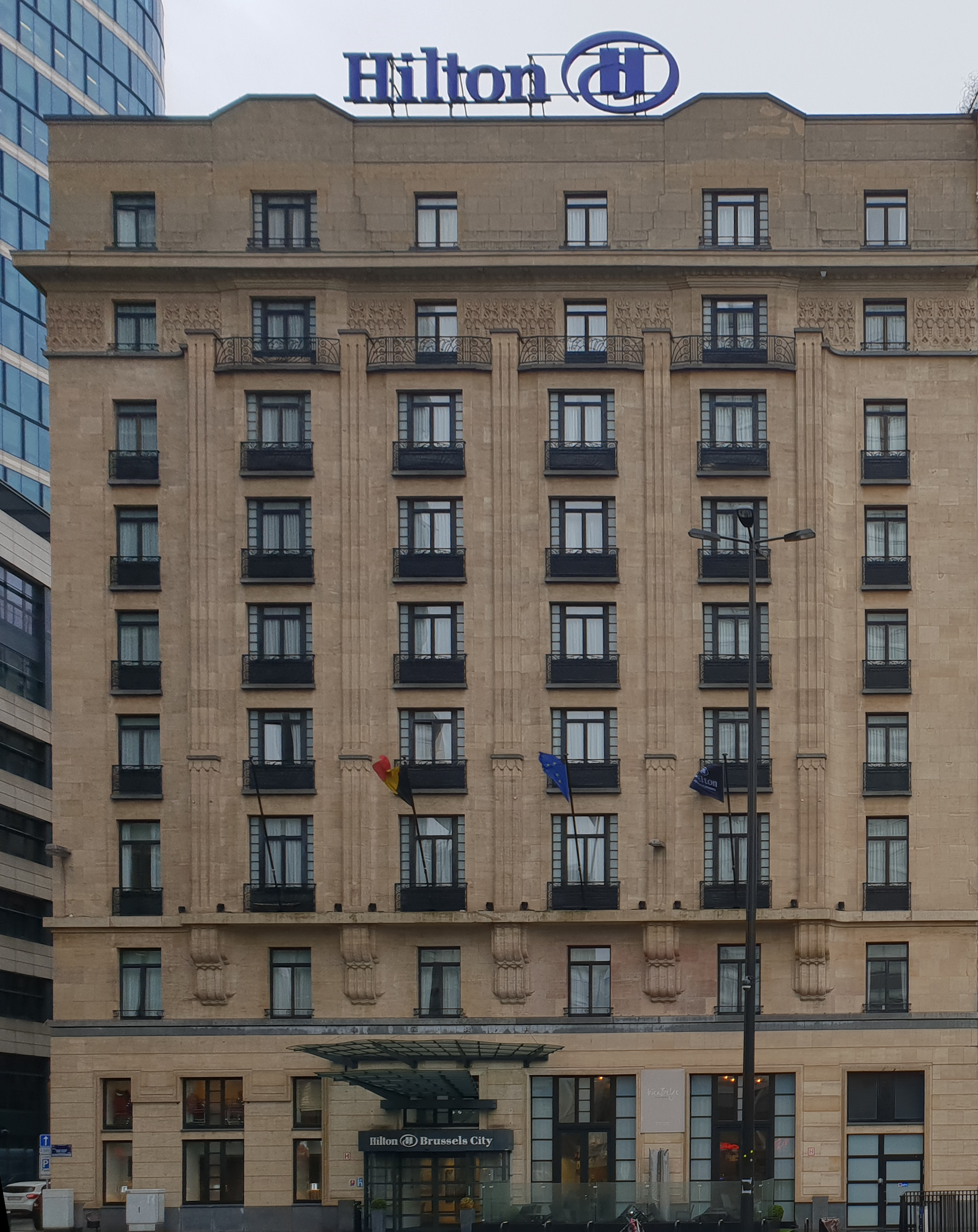 Hôtel Hilton de Bruxelles